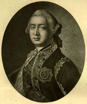 Alexei Grigorjewitsch Rasumowski